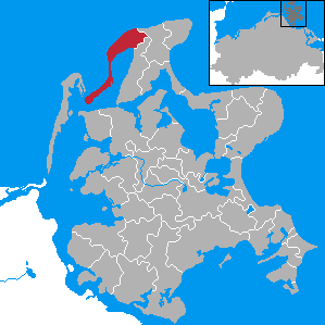 Dranske, Landkreis Rügen, Mecklenburg-Vorpommern